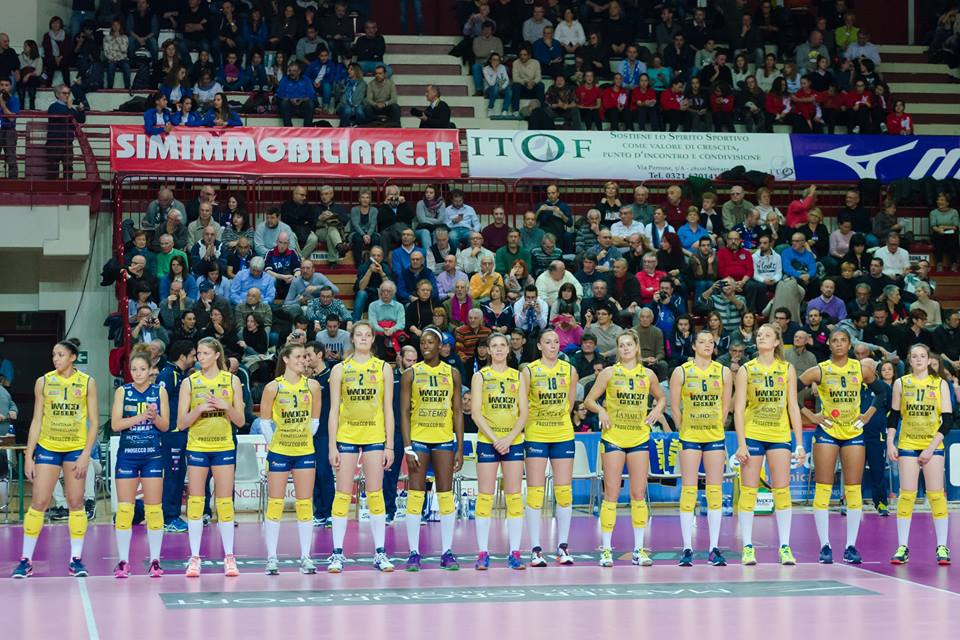 Stagione 2015-16